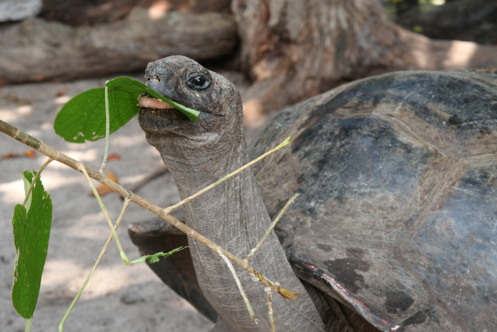 Tortue sur l'Ile Curieuse